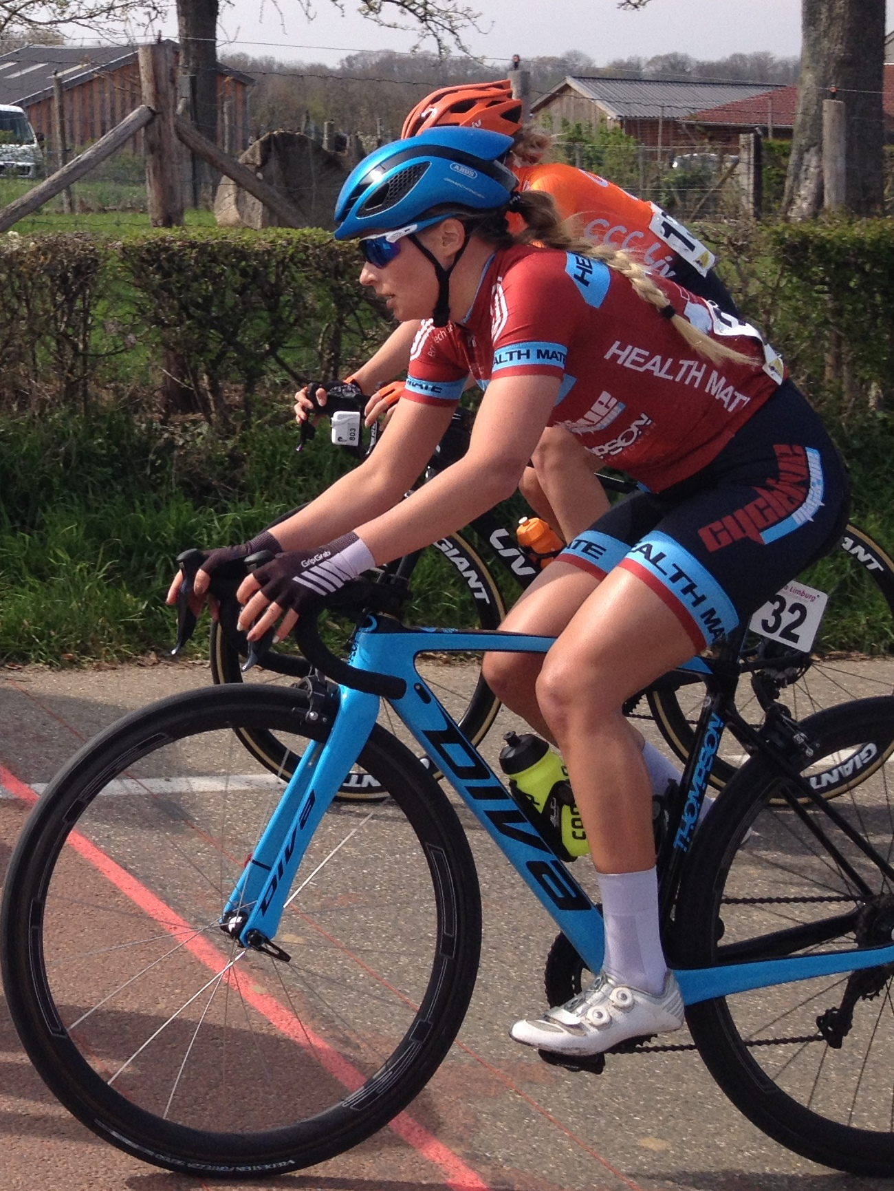 Volta Limburg Classic 2019 voor vrouwen met start en finish in Eijsden, Limburg, Nederland